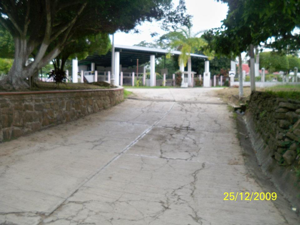 En este lugar se encuentran las canchas de basquetbol y donde se reúne la gente para eventos populares.